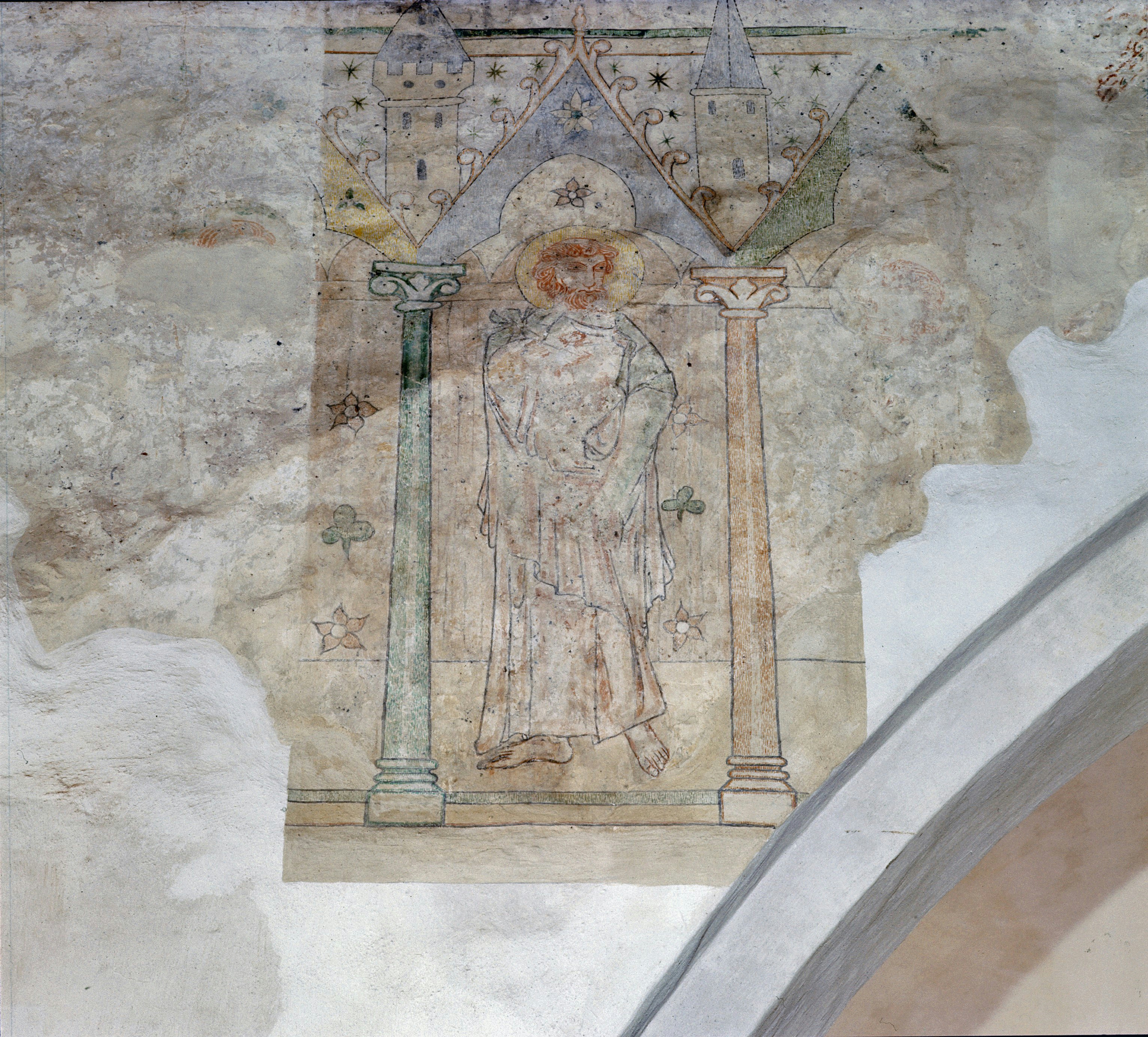 Nederlands Hervormde Kerk: Interieur, muurschildering boven de ingang naar het koor